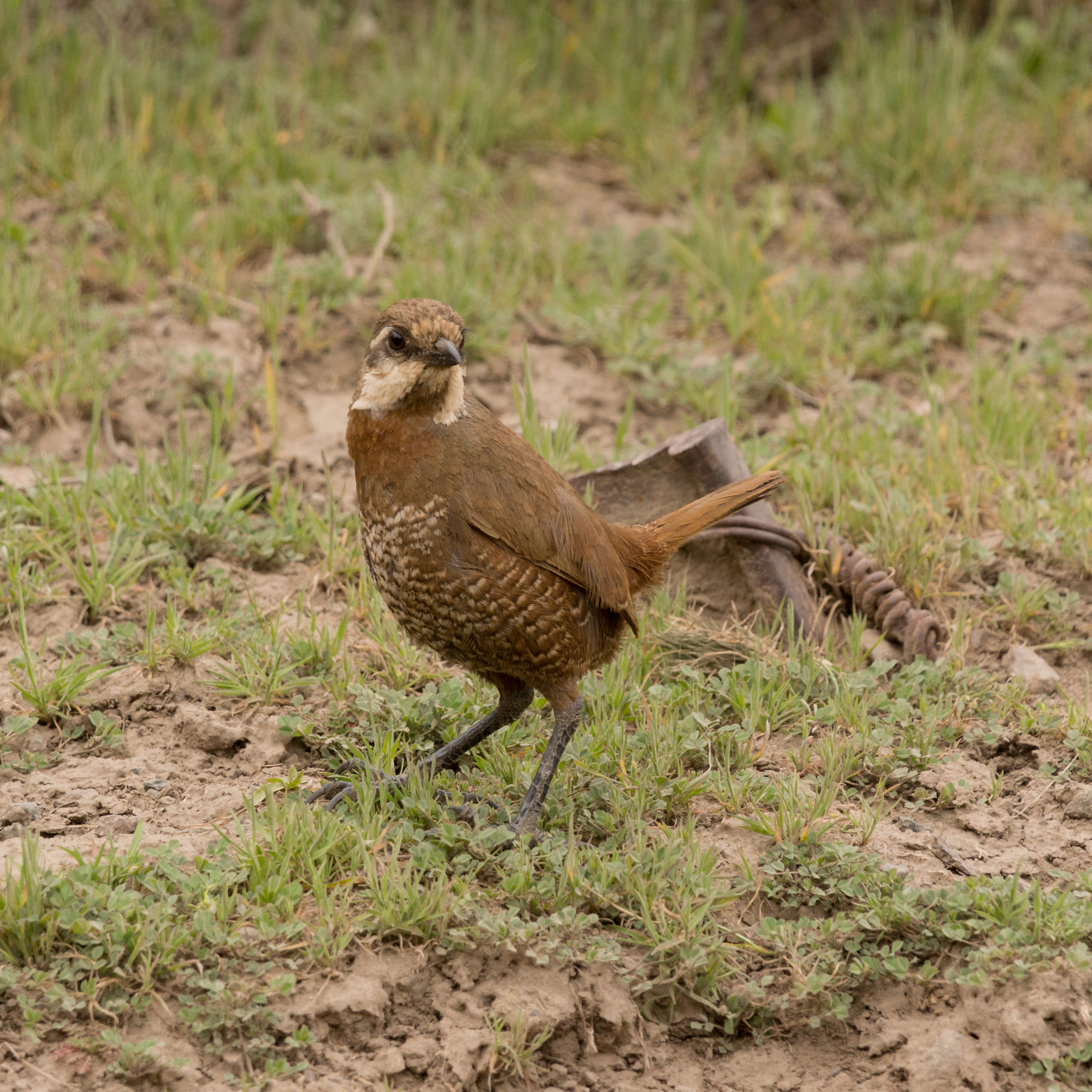 Foto de Turca (Pteroptochos megapodius) tomada en el Cajón del Maipo